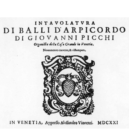 Page de titre de lIntavolatura di Balli d’Arpicordo, de Giovanni picchi, publié à Venise par Alessandro Vincenti en 1621.